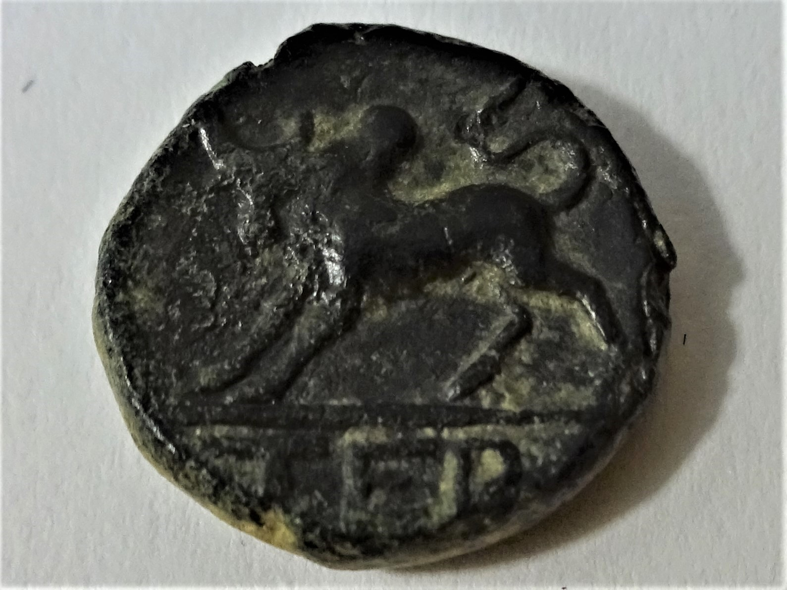 Bronzemünze aus Termessos, Zebustier und TEP, ca. 71-39 v. Chr., Szaievert/Sear 5612